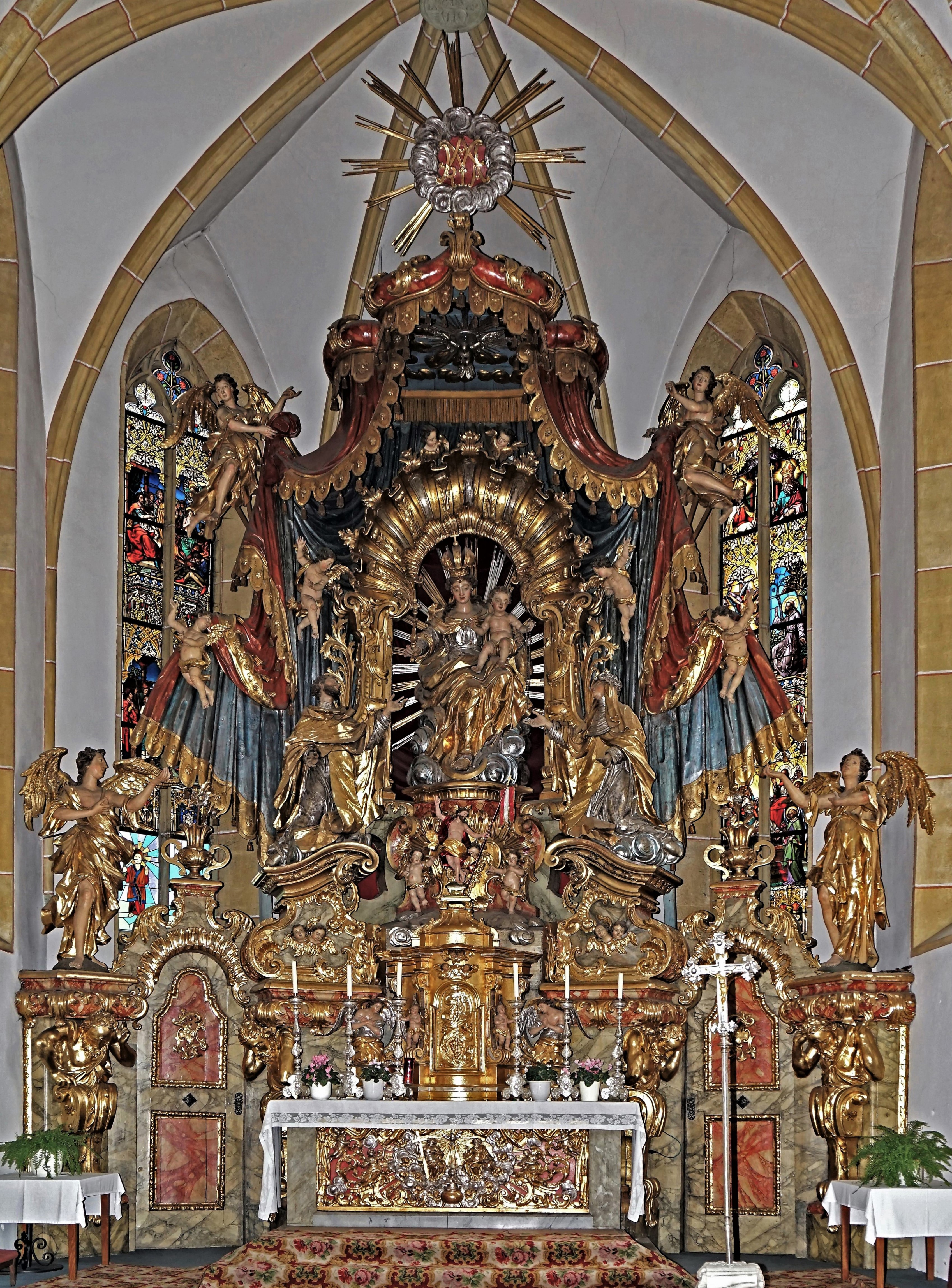 Stadtpfarrkirche St. Veit an der Glan, barocker Hochaltar